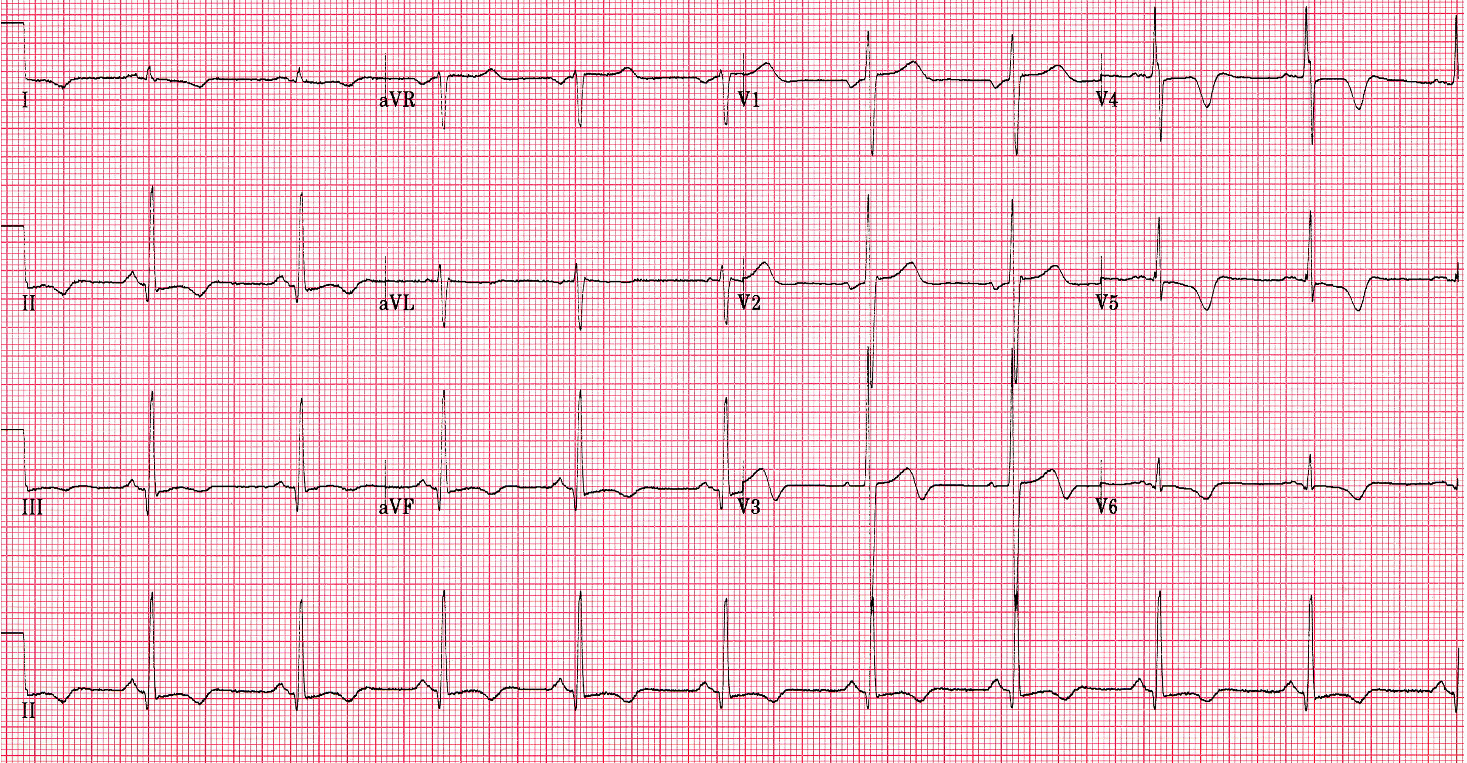 HOCM